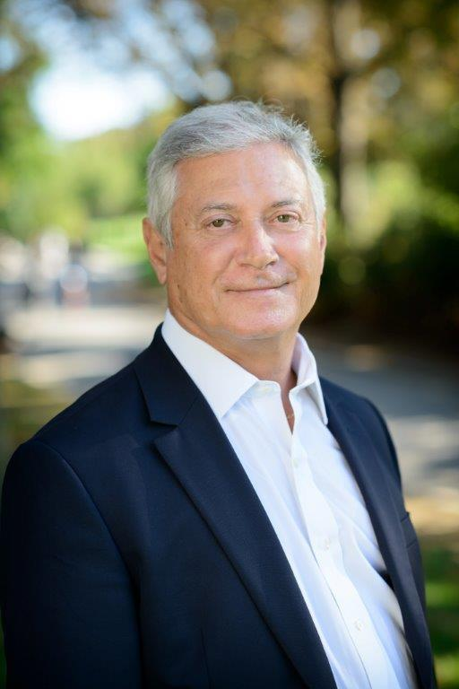 Richard Dell'Agnola (2013), maire de Thiais (94)